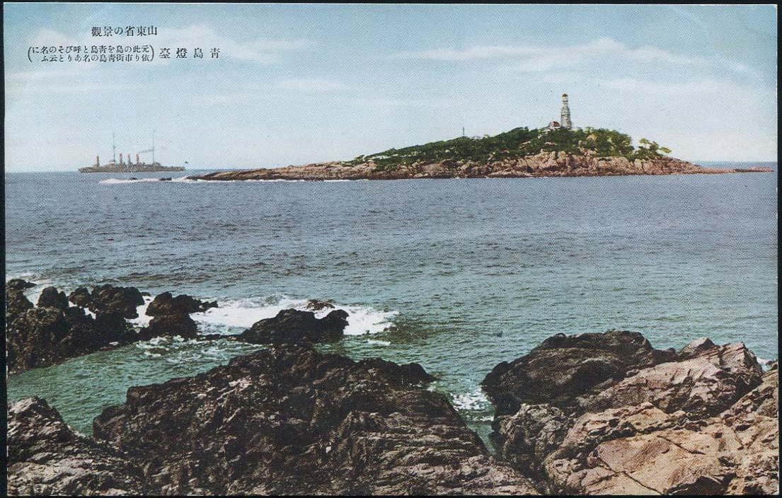 小青岛三十年代